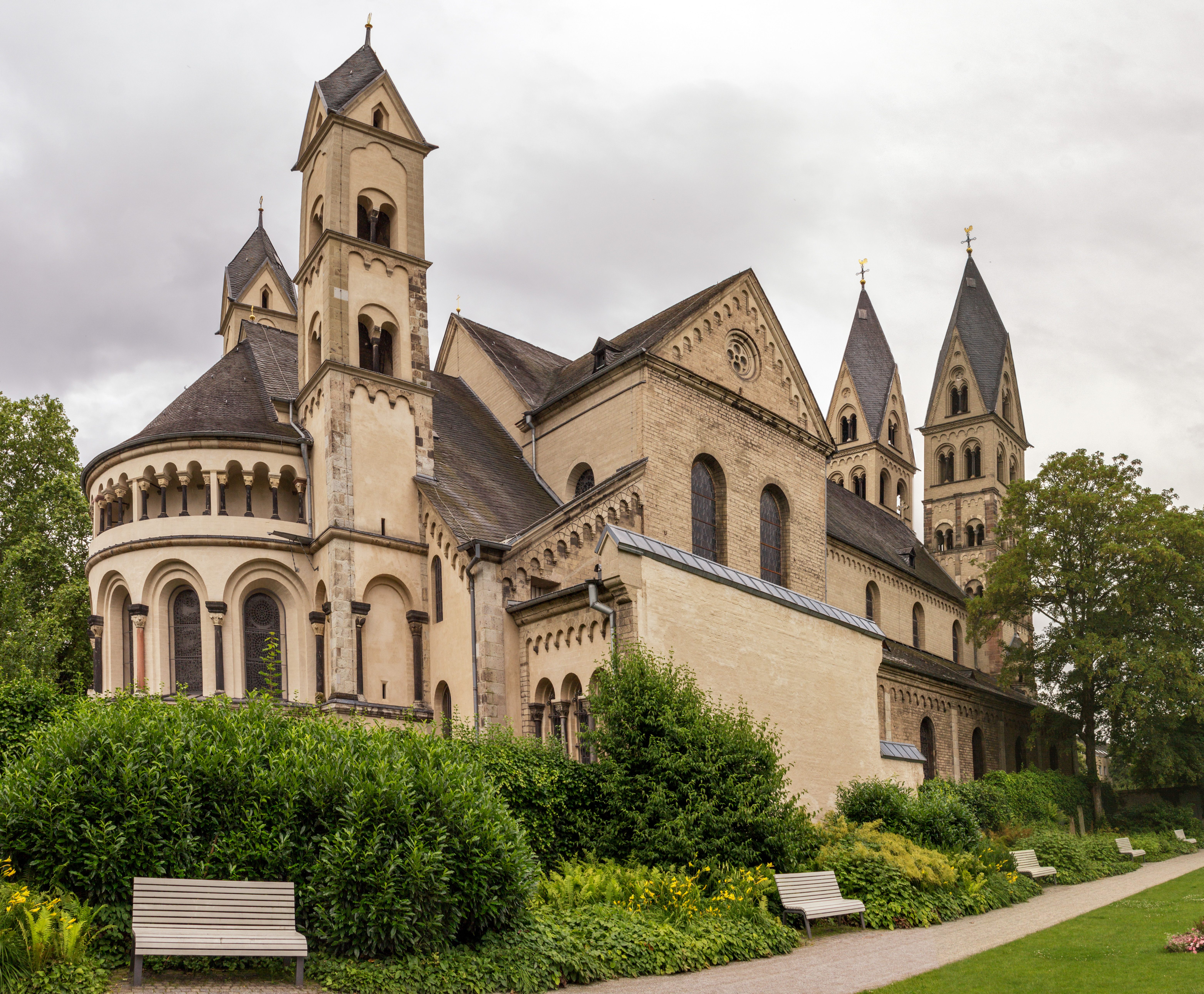 St. Kastor, Koblenz